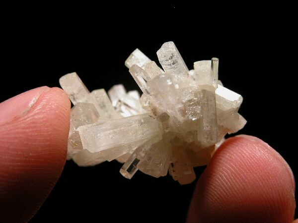 zrost beryli, pochodzenie Namibia; autor zdjęcia Piotr Menducki; 12.o8.2006r